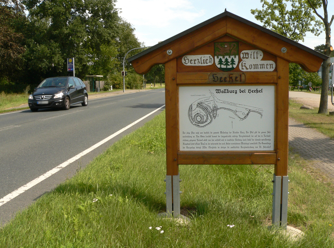 Ortsschild Heeßel